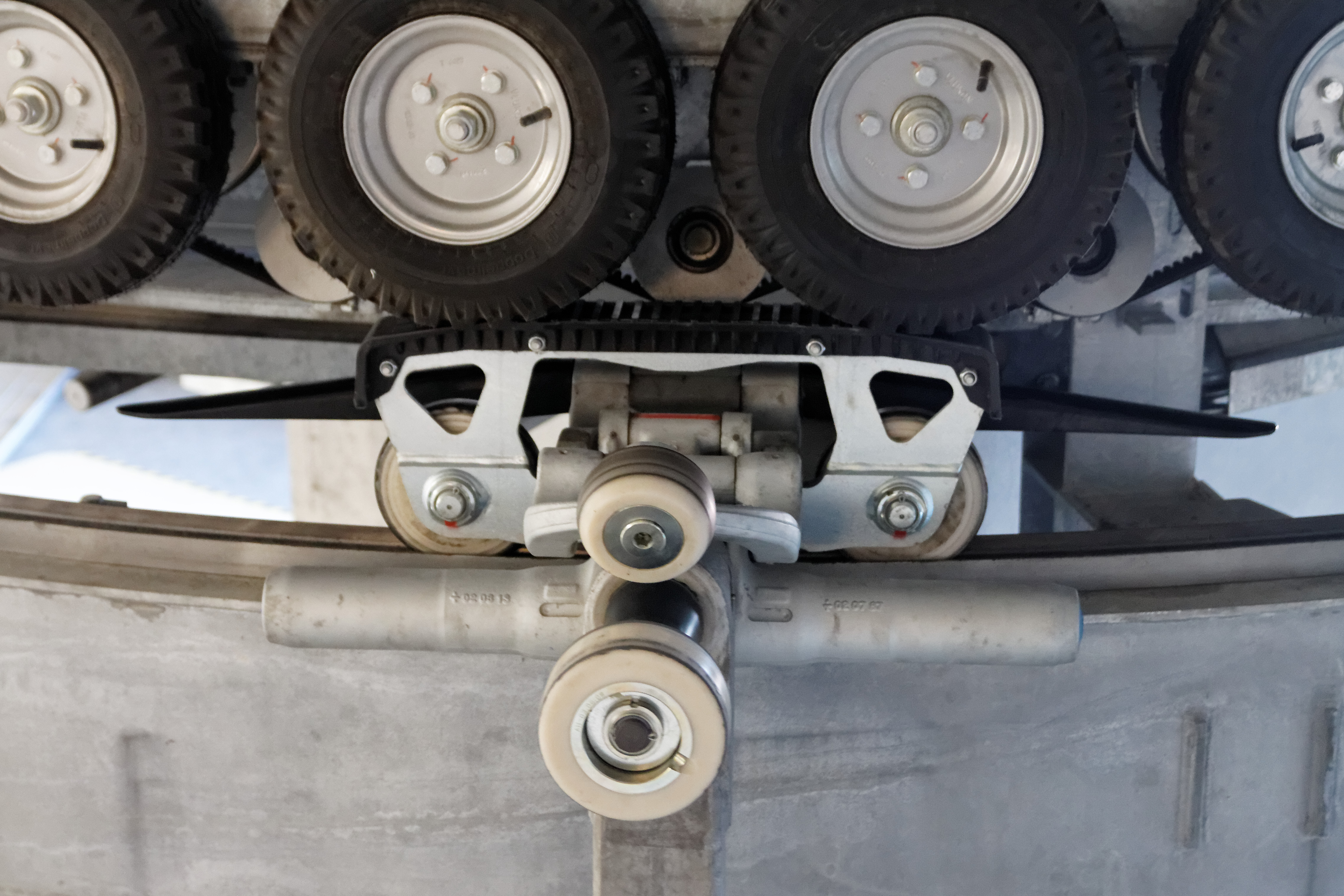 Detalle del mecanismo de tracción de una cabina del nuevo teleférico de Gaia a su paso por la estación oeste. Portugal.